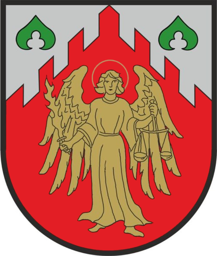 Der Markt führt als Wappen im goldenen Schilde den Erzengel Michael im blauen Gewande, geflügelt, mit einem goldenen Kreuz auf schwarzer Scheibe an der Brust, in der Rechten das Flammenschwert, in der Linken eine goldene Waage.